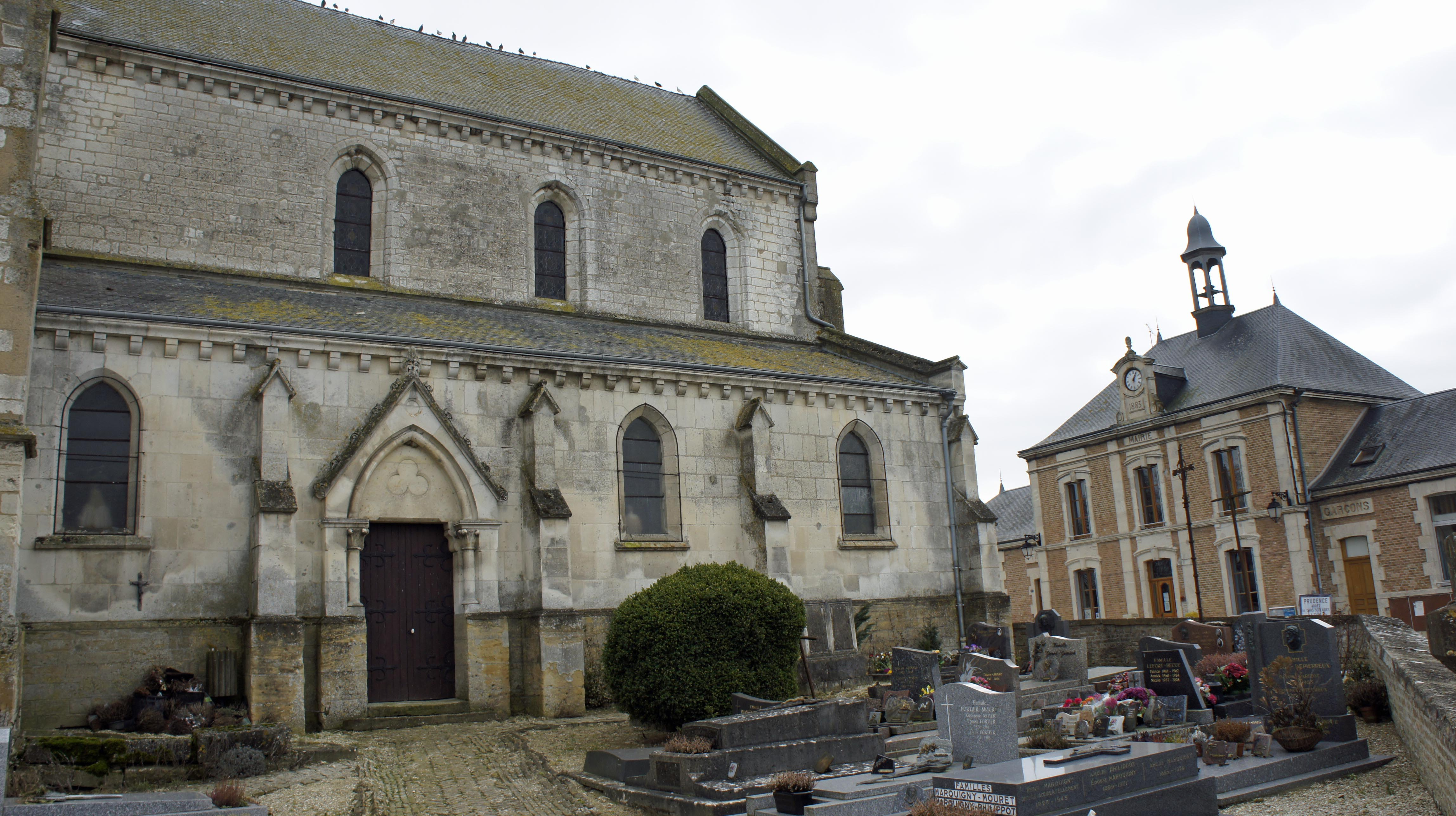 Vue de l'église, du cimetière et de la mairie d'Avançon.